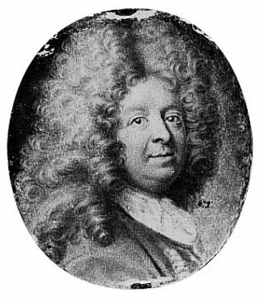 Jacob Paul von Gundling (1673-1731), German historian